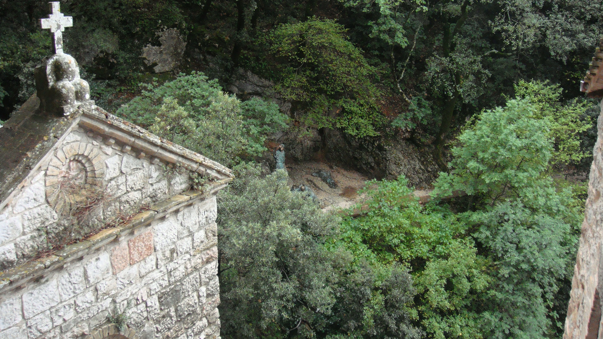 PANORAMICA DELL'EREMO SUL MONTE CUCCO